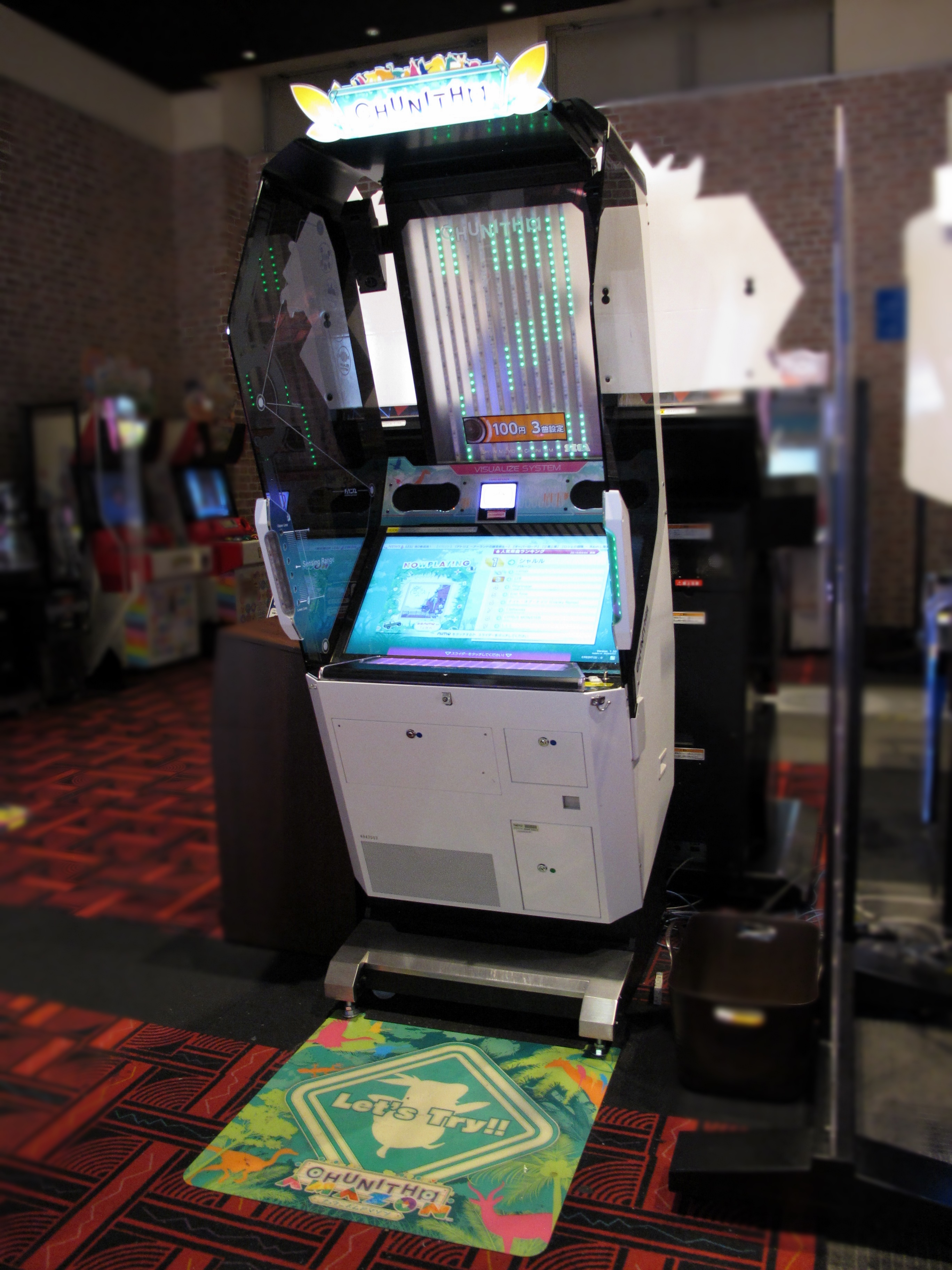 『チュウニズム アマゾン』のアーケードゲーム筐体。タイトーステーション・イオンタウン水戸南店にて。 Canon PowerShot G11